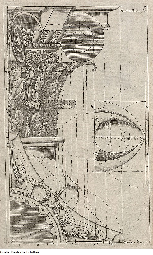 Original image description from the Deutsche Fotothek Architektur & Akanthus & Volute & Kapitell & Eierstab